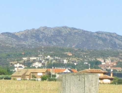 Pico de El Estepar (Comunidad de Madrid, España).